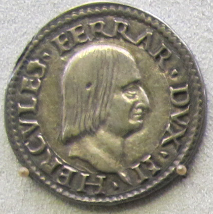 Ferrara, ercole I, testone, 1471-1505 recto